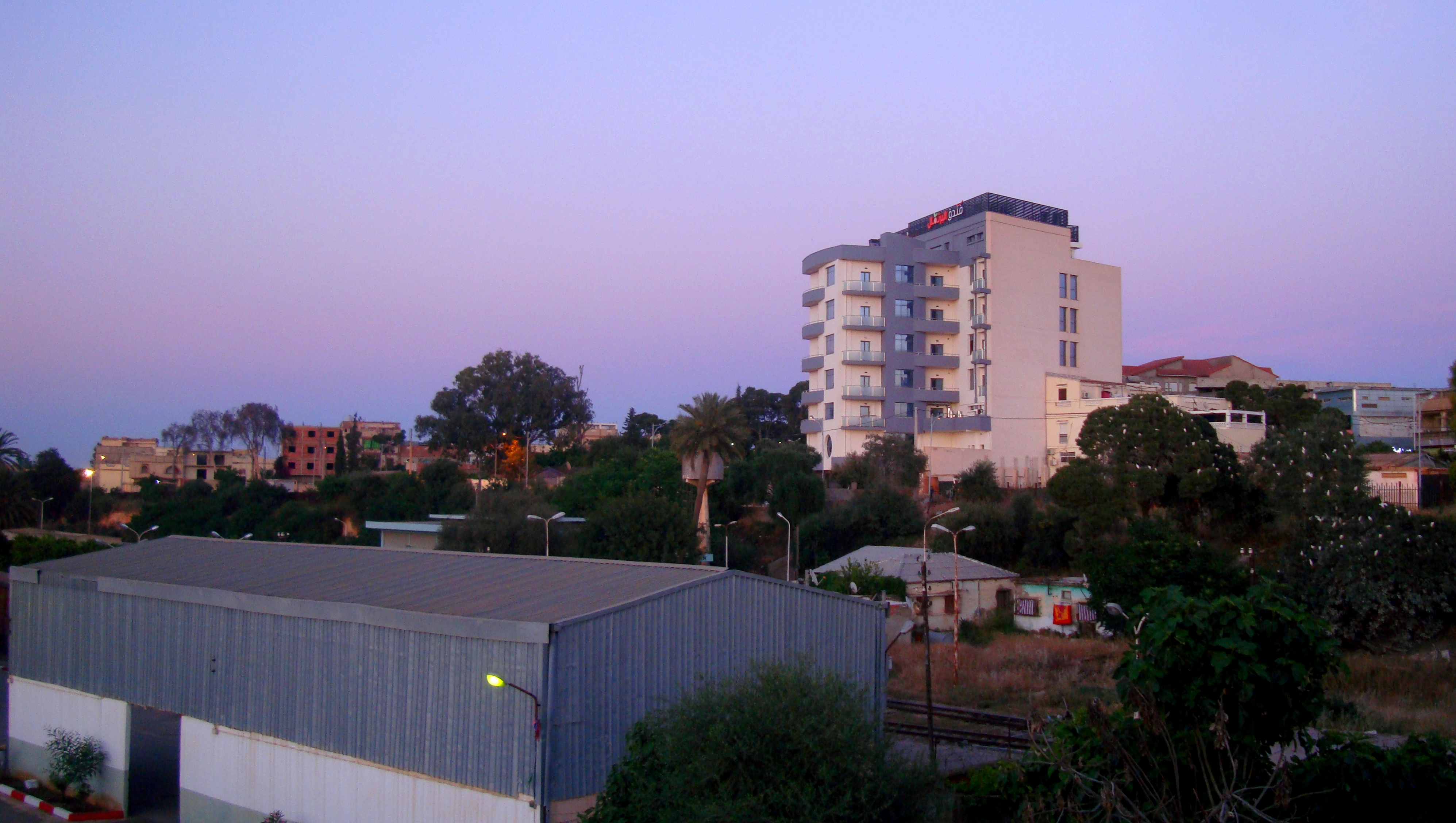 Vue sur l'Hôtel les oranges (Hay Meddahi "Zeboudj")